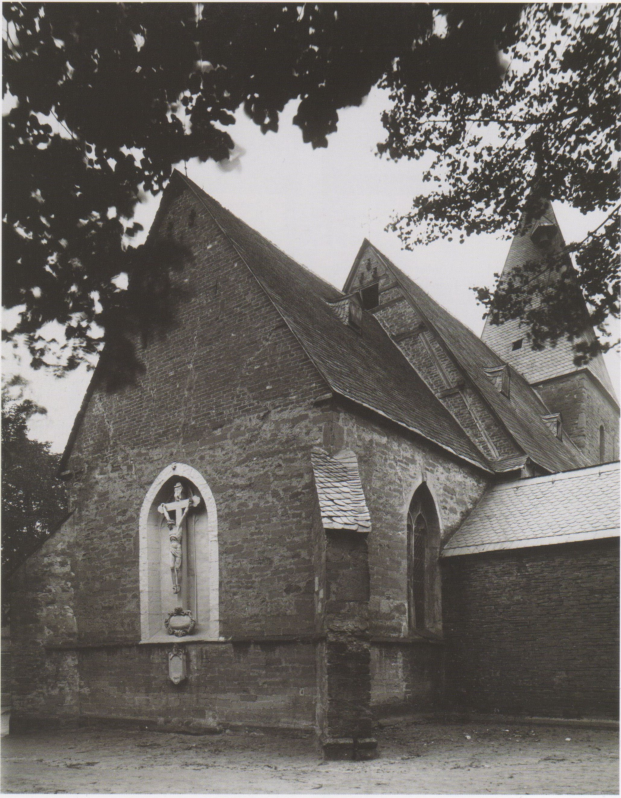 Das Foto zeigt die "Alte Kirche" St. Stephanus in Bockum-Hövel, heute Stadtbezirk von Hamm, im Jahre 1891.